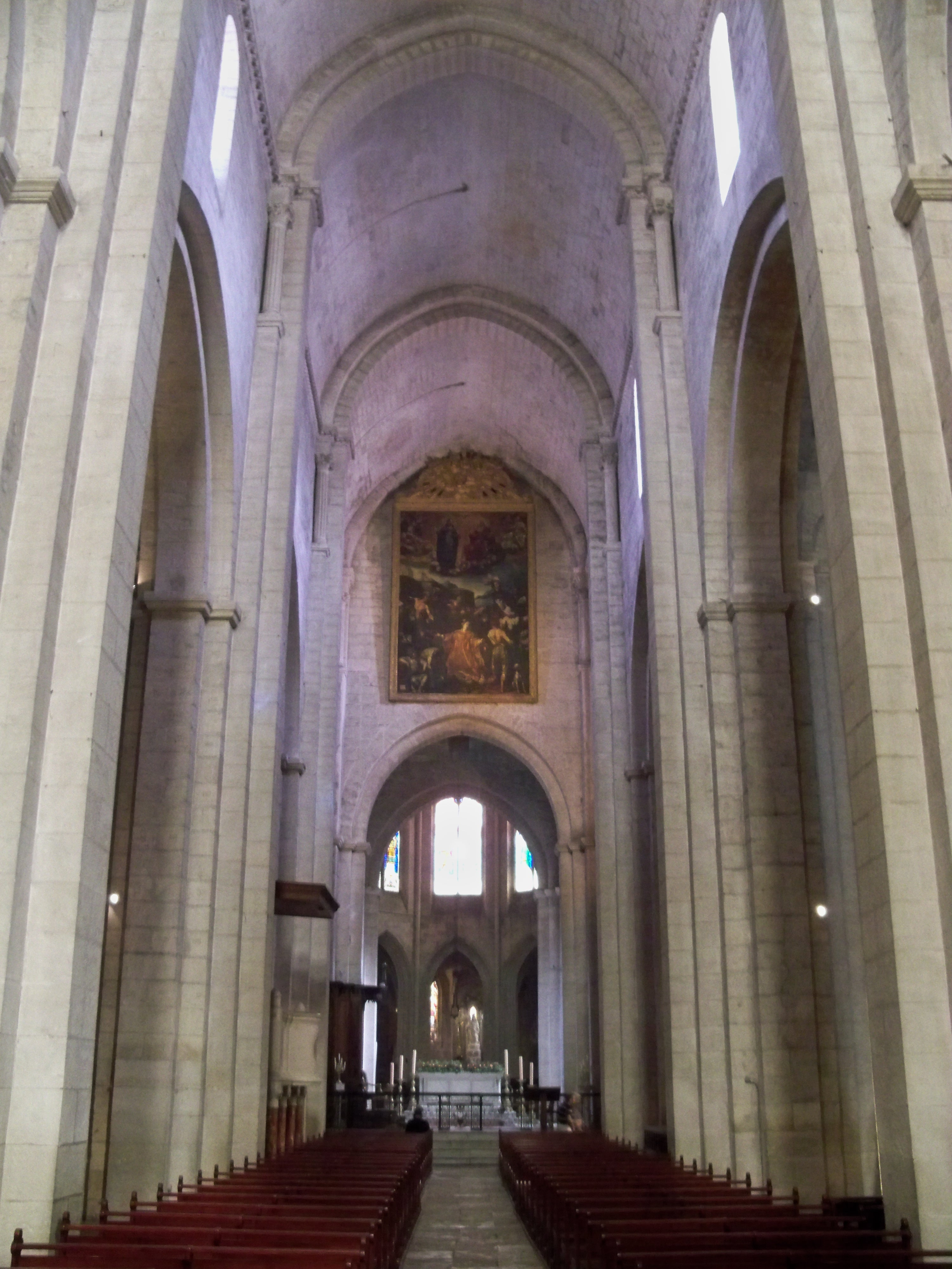 Nef Saint Trophime d'Arles (13)